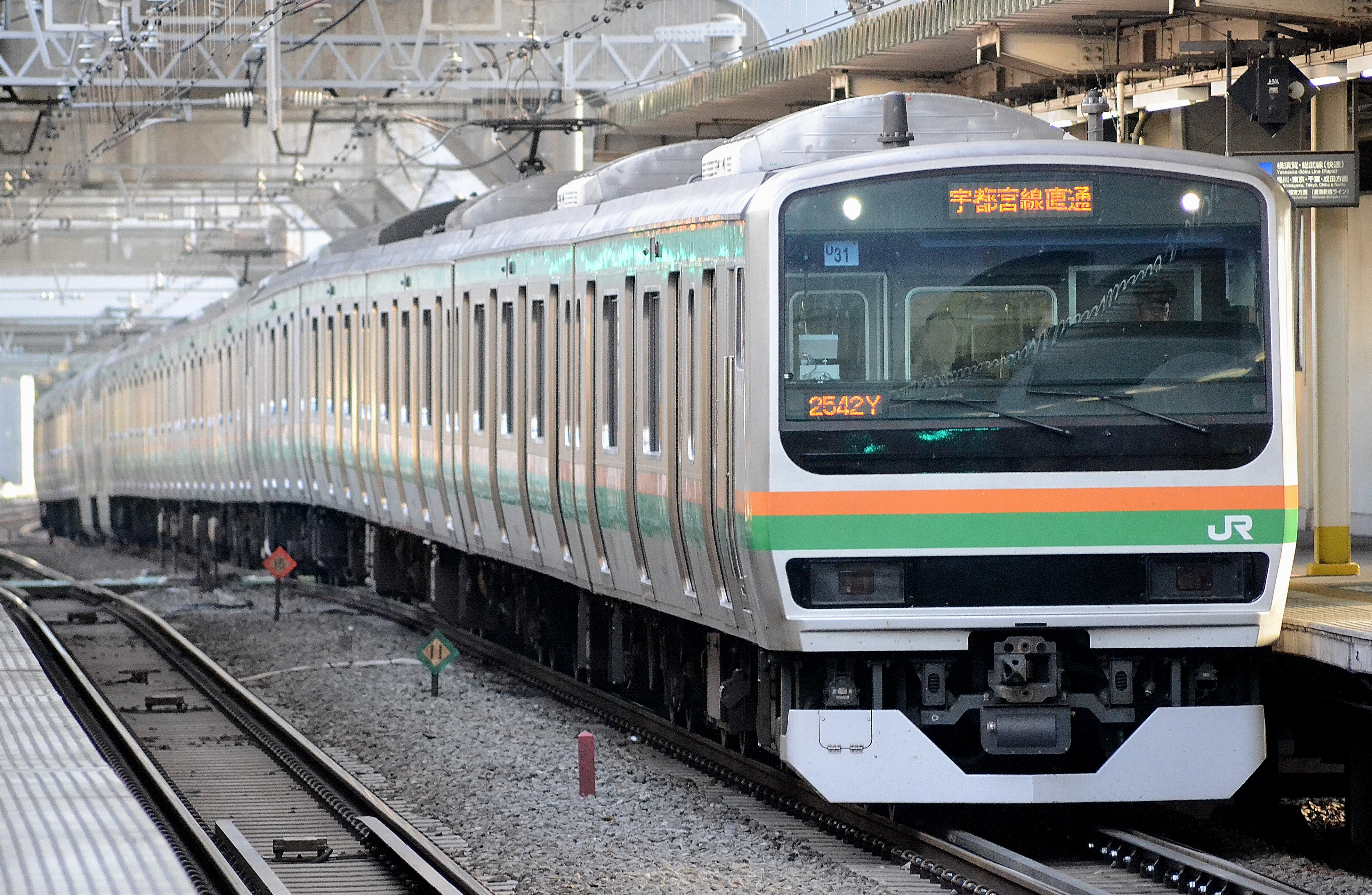 横須賀線、西大井駅に到着する、宇都宮線直通の｢湘南新宿ライン」のE231系